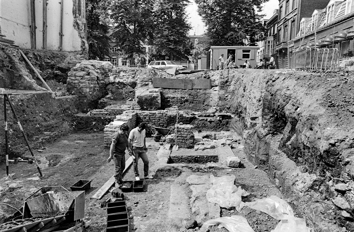 opgravingen